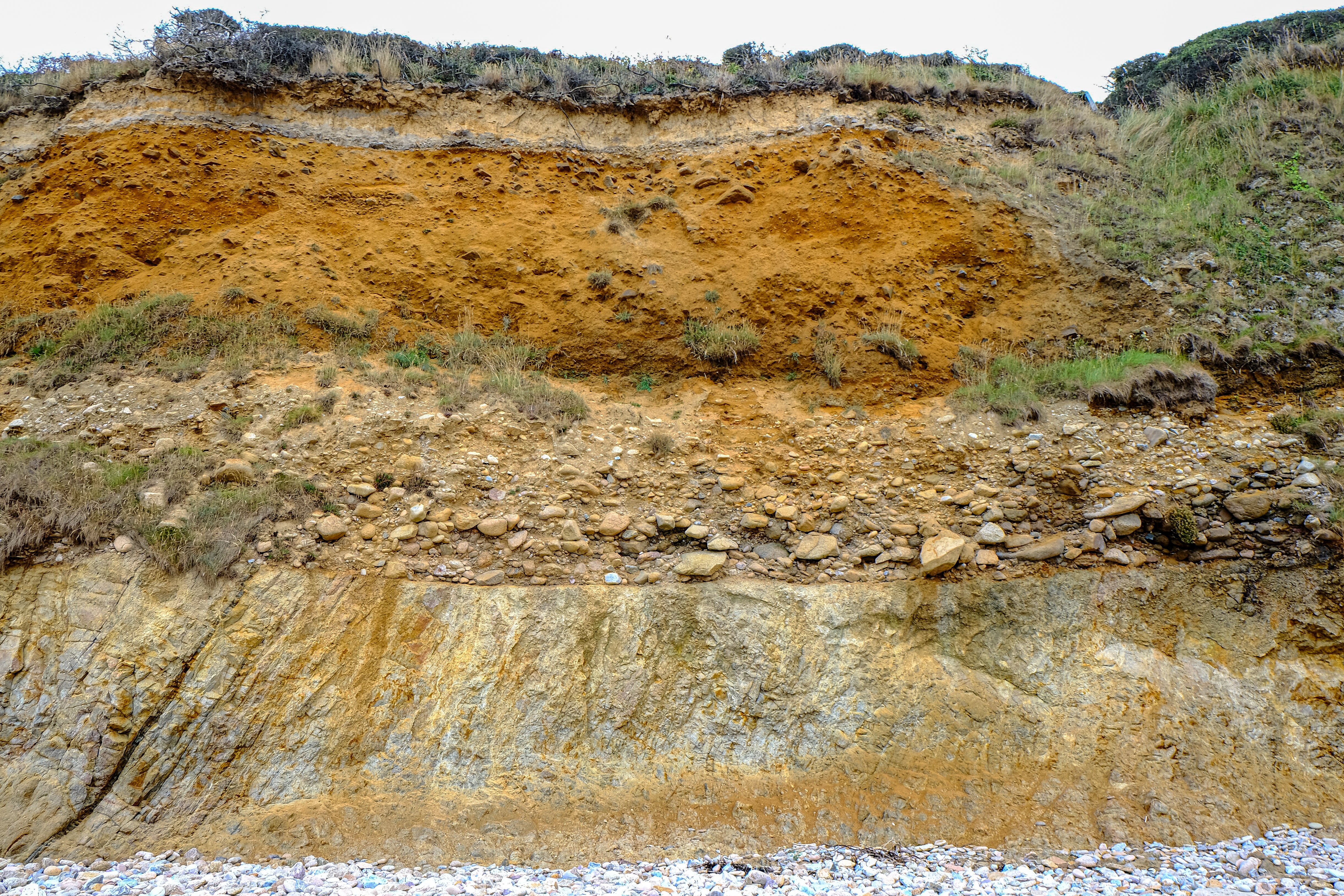 Falaise de l'anse du Brick à Fermanville. Perchée à 6,6 m NGF sur un paléo-platier formé dans le granite, la plage éémienne est épaisse de 2 à 2,5 m. Elle est surmontée d'un head weichsélien d'environ 3 m. La hauteur totale avoisine les 15 mètres.